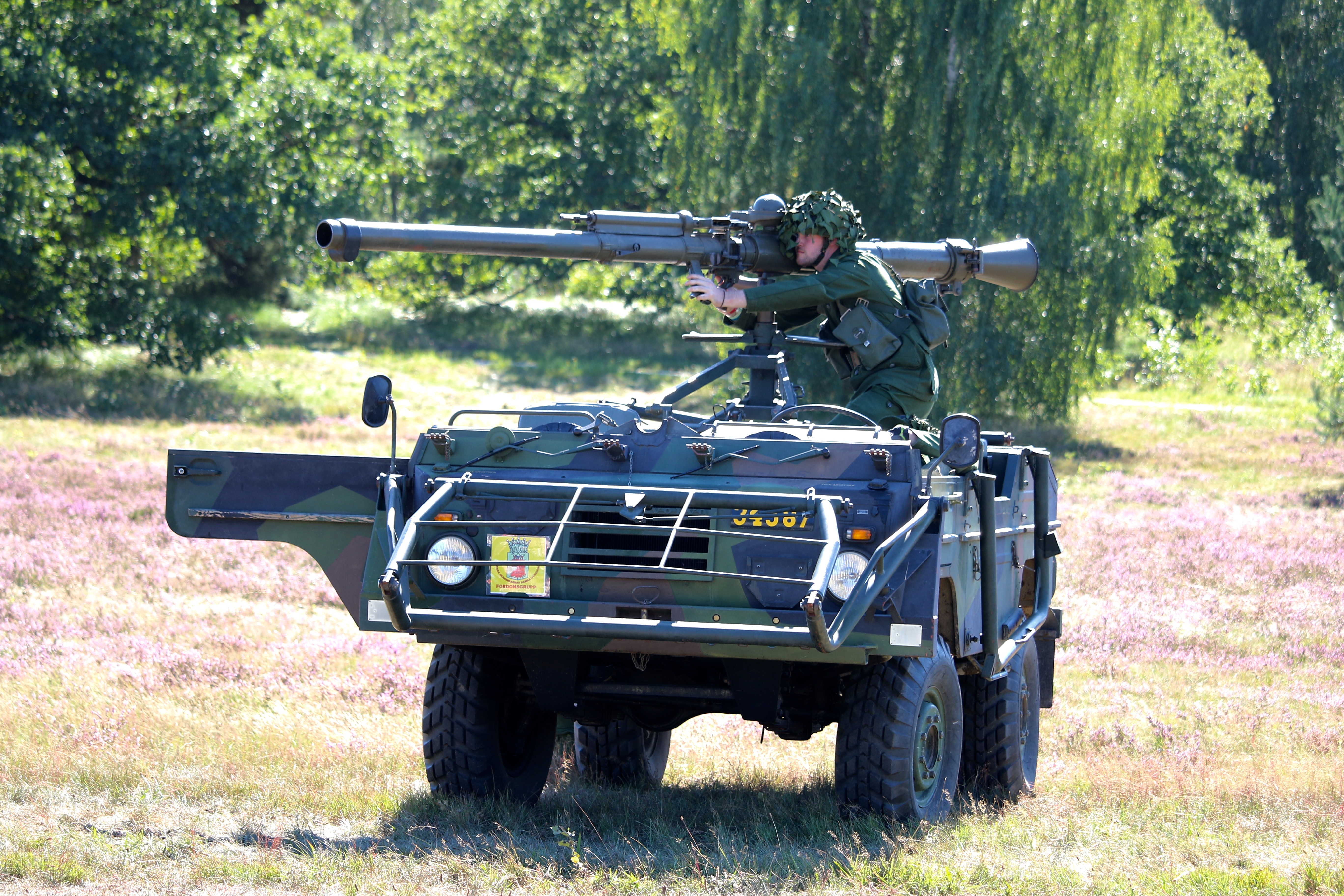 Pansarvärnspjästerrängbil 1111 Revinge 2016